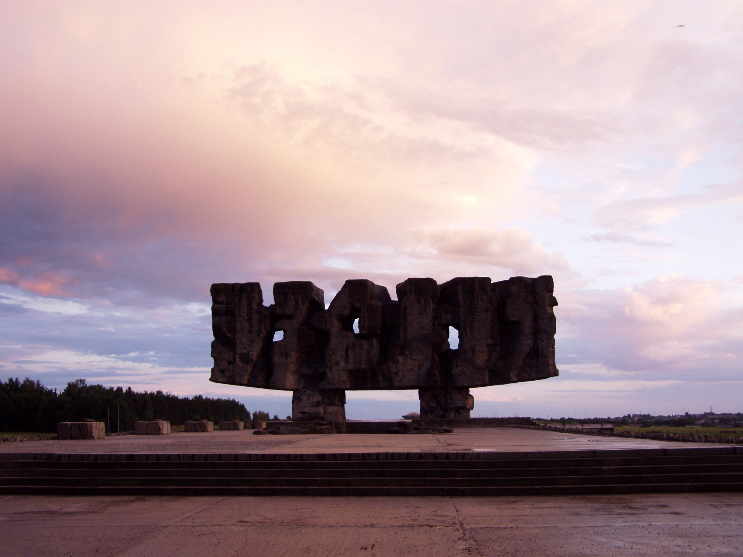 Pomnik Walki i Męczeństwa w Lublinie, KL Majdanek